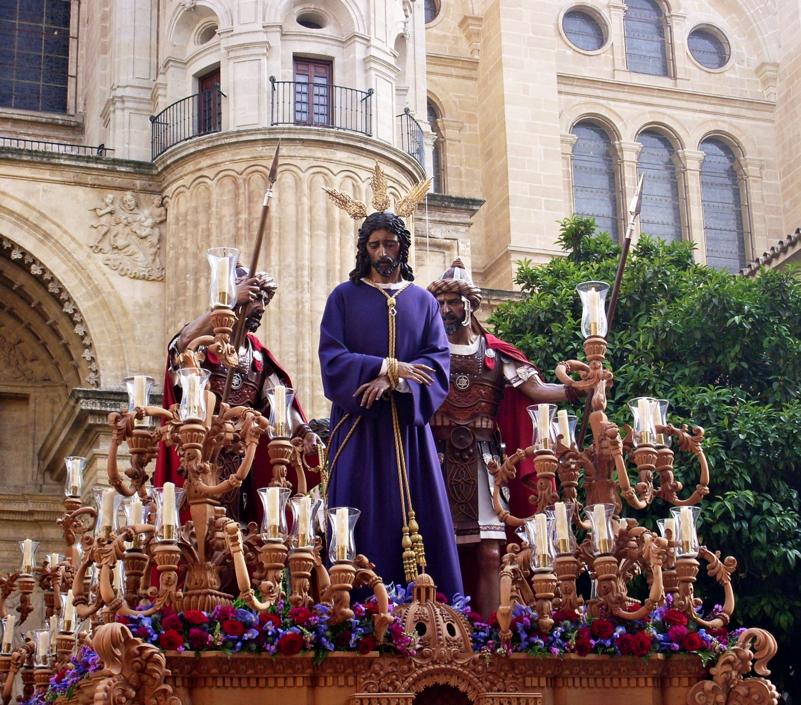 Jesús de la Soledad de la cofradía del Dulce Nombre saliendo de la catedral (Málaga)